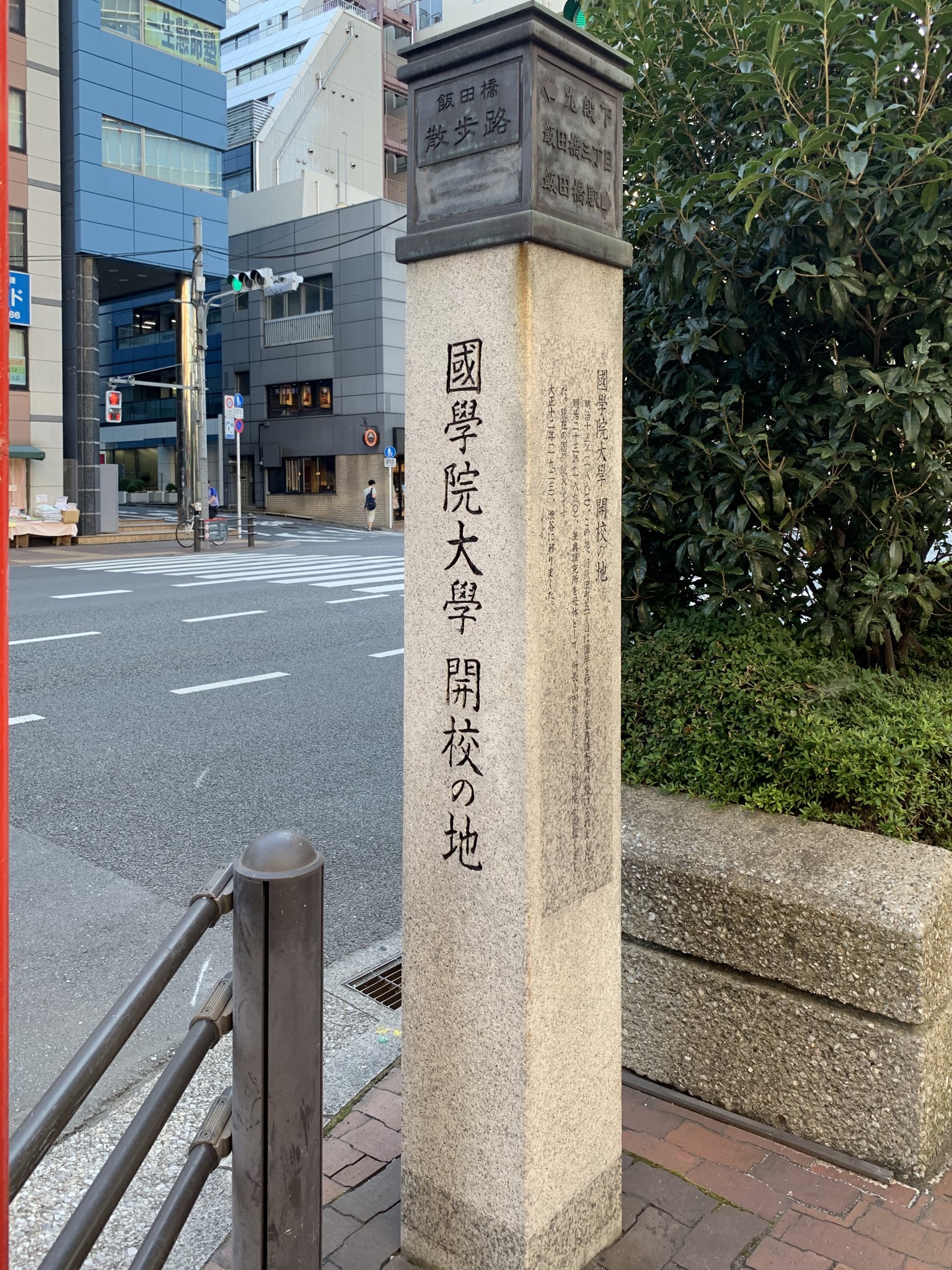 東京区政会館前の「國學院大學 開校の地」の碑